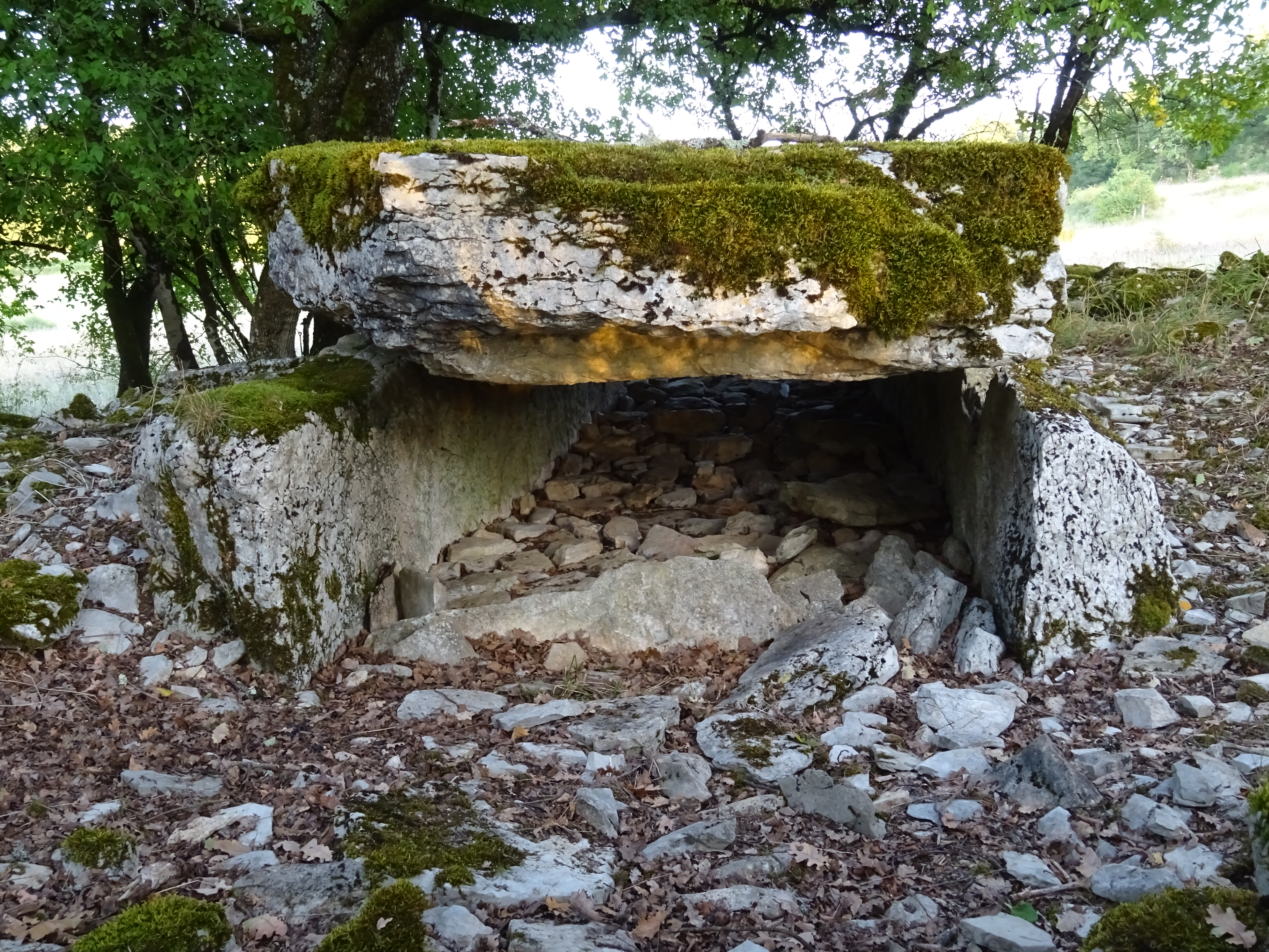 Dolmen de Lapeyrière à Brengues (Lot, France).